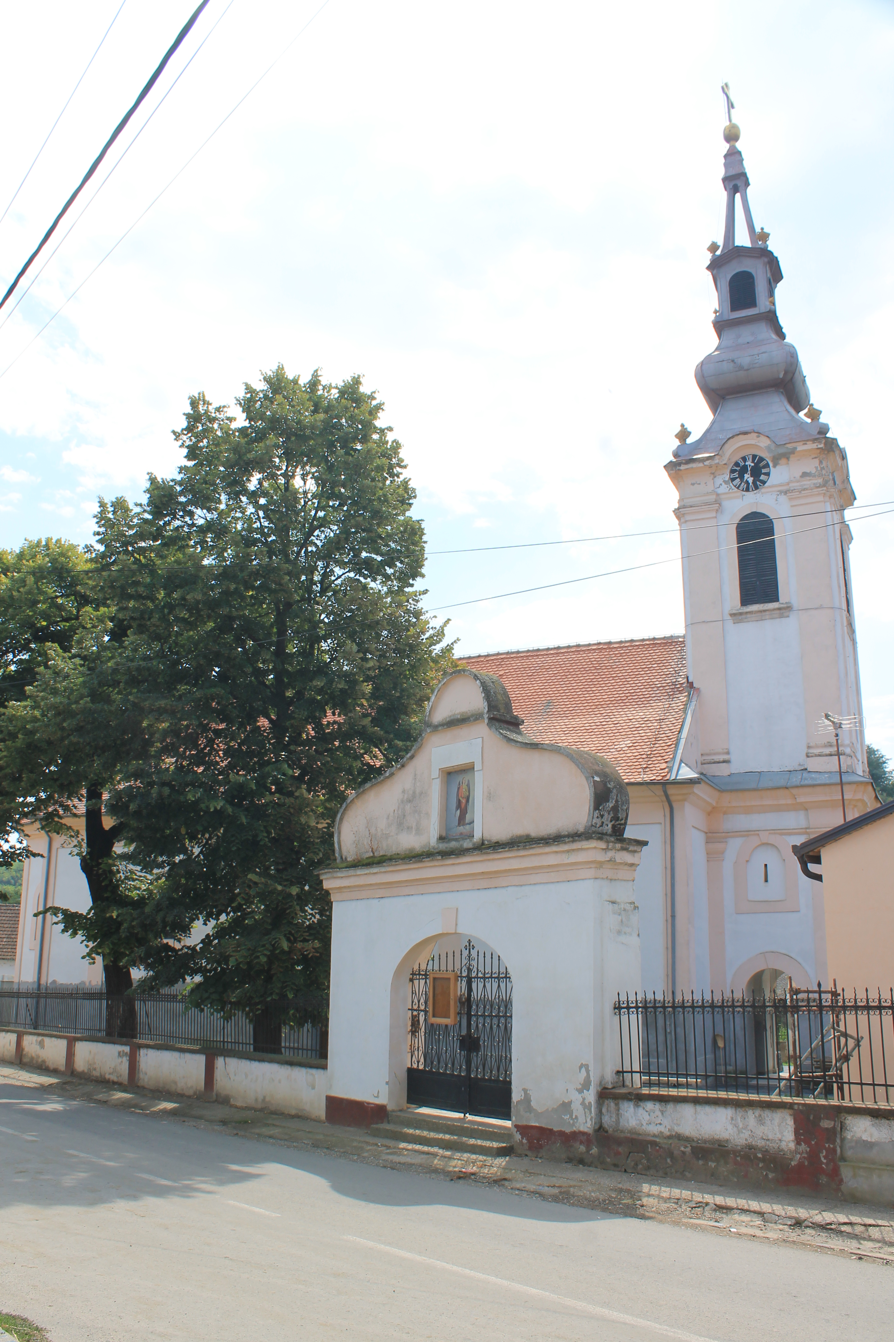 Crkva Sv. Arhangela Gavrila (Susek)